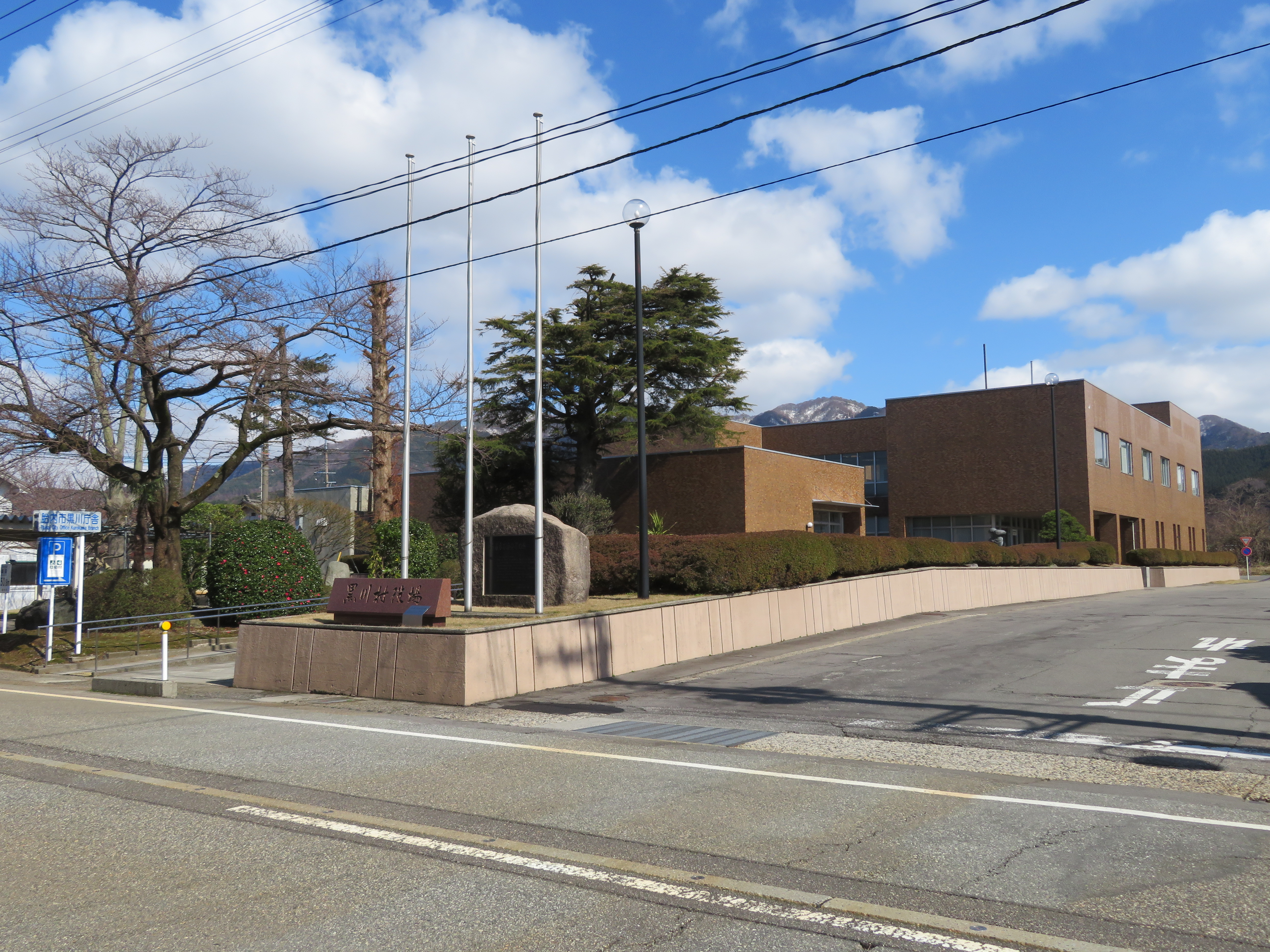 胎内市役所黒川庁舎（旧黒川村役場庁舎）